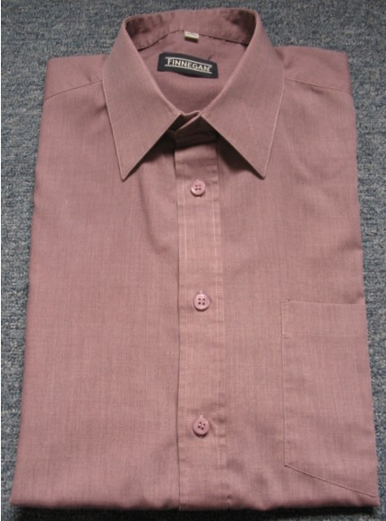 Hemd aus PES/CO